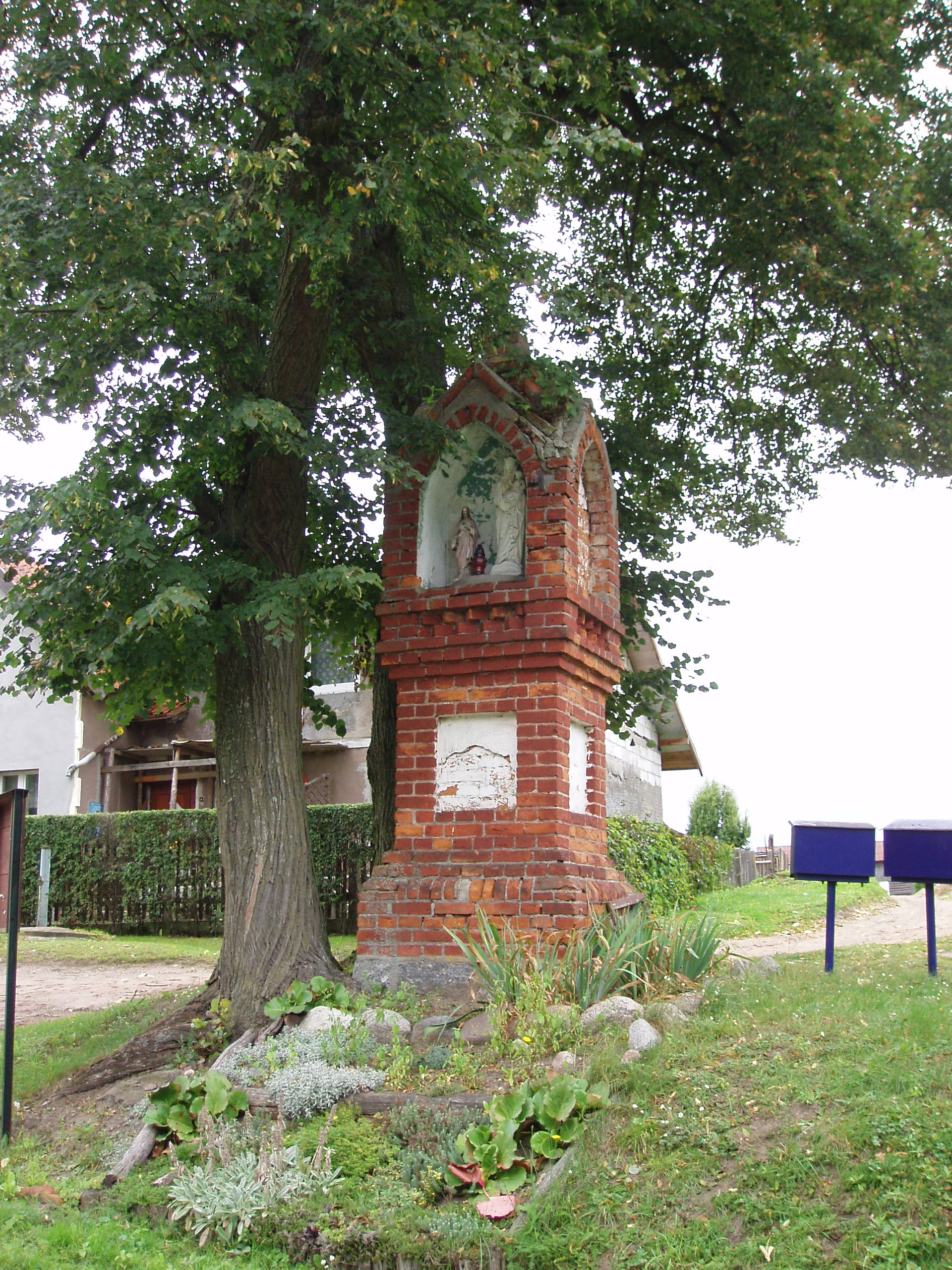 Kapliczka w Trękusie, neogotycka z końca XIX w. Usytuowana przy sklepie w centrum wsi. Wymurowana na wysokiej, dwudzielnej bazie, w której usytuowano kwadratowe płyciny. W korpusie kapliczki ostrołukowa nisza z figurami Madonny z Dzieciątkiem i Najświętszego serca Pana Jezusa.